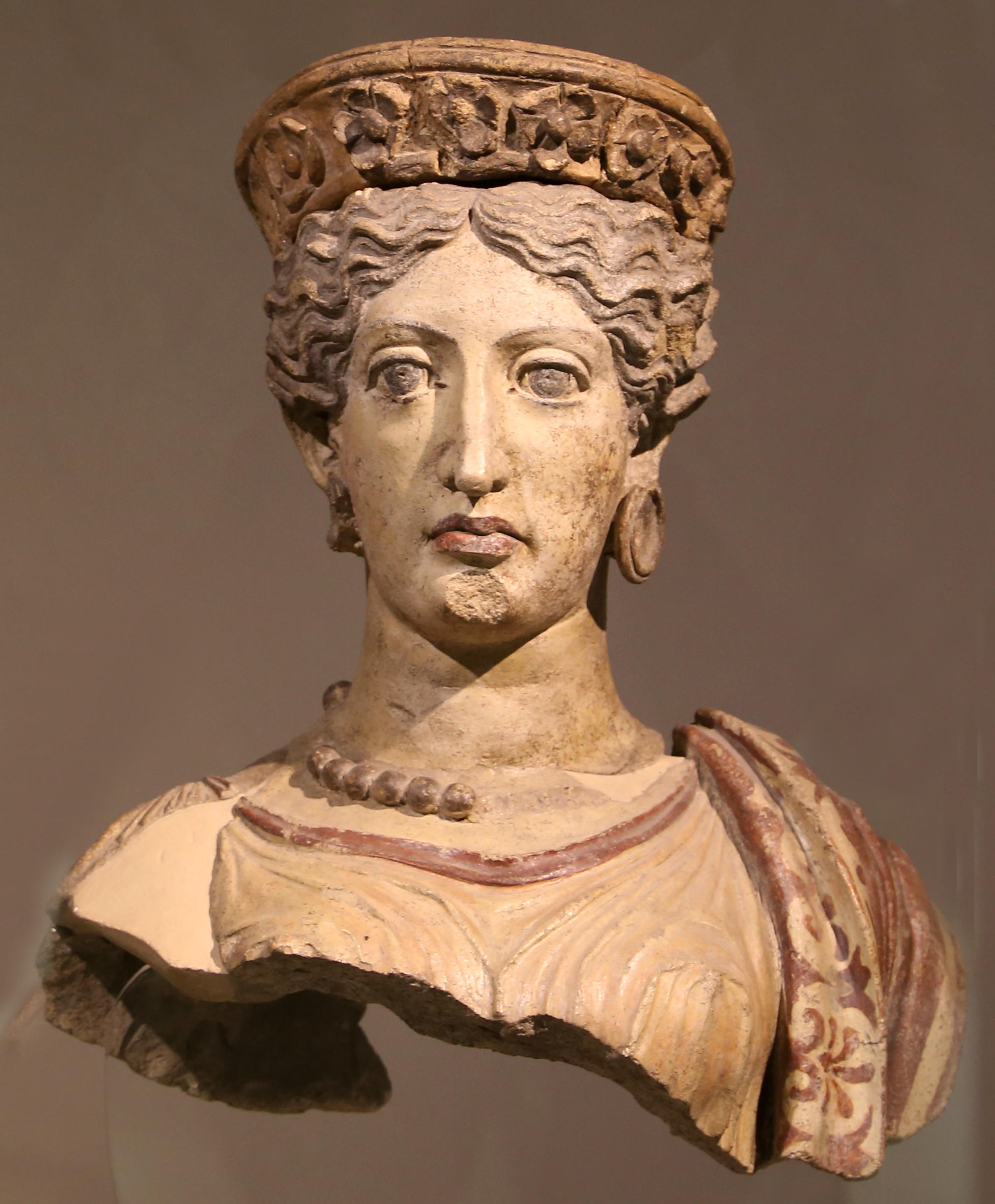 Museo nazionale etrusco di Villa Giulia This is a photo of a monument which is part of cultural heritage of Italy.